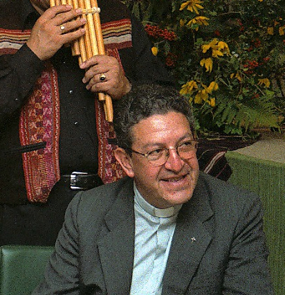 Erzbischof Edmundo Abastoflor bei einer Veranstaltung der Bolivienpartnerschaft 1999 in Mülheim-Kärlich.